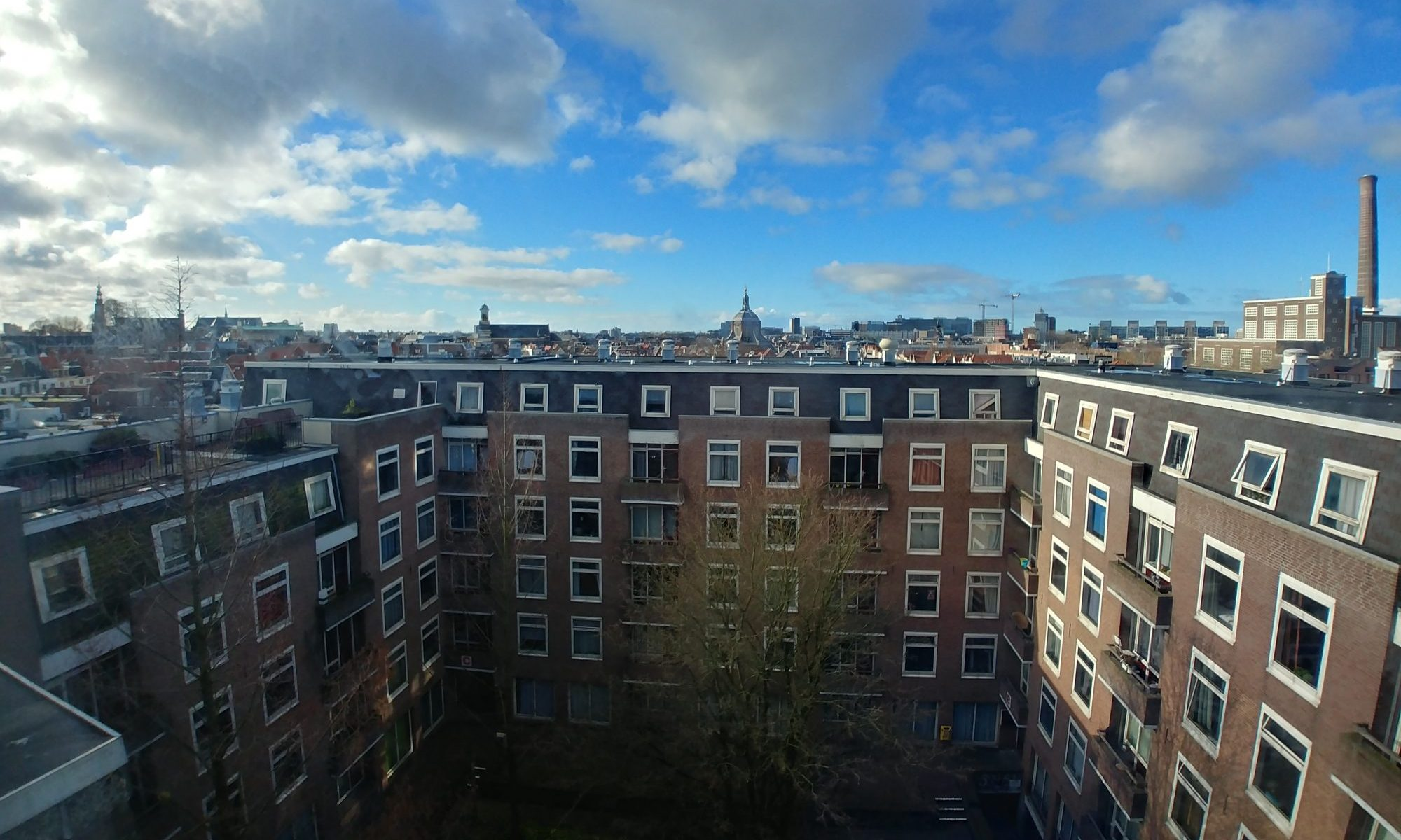 Foto genomen vanaf de 6e verdieping van de Pelikaanhof. O.a. zichtbaar, de Leidse stedelijke gasfabriek, het LUMC, de Marekerk en het Academiegebouw van de Universiteit Leiden